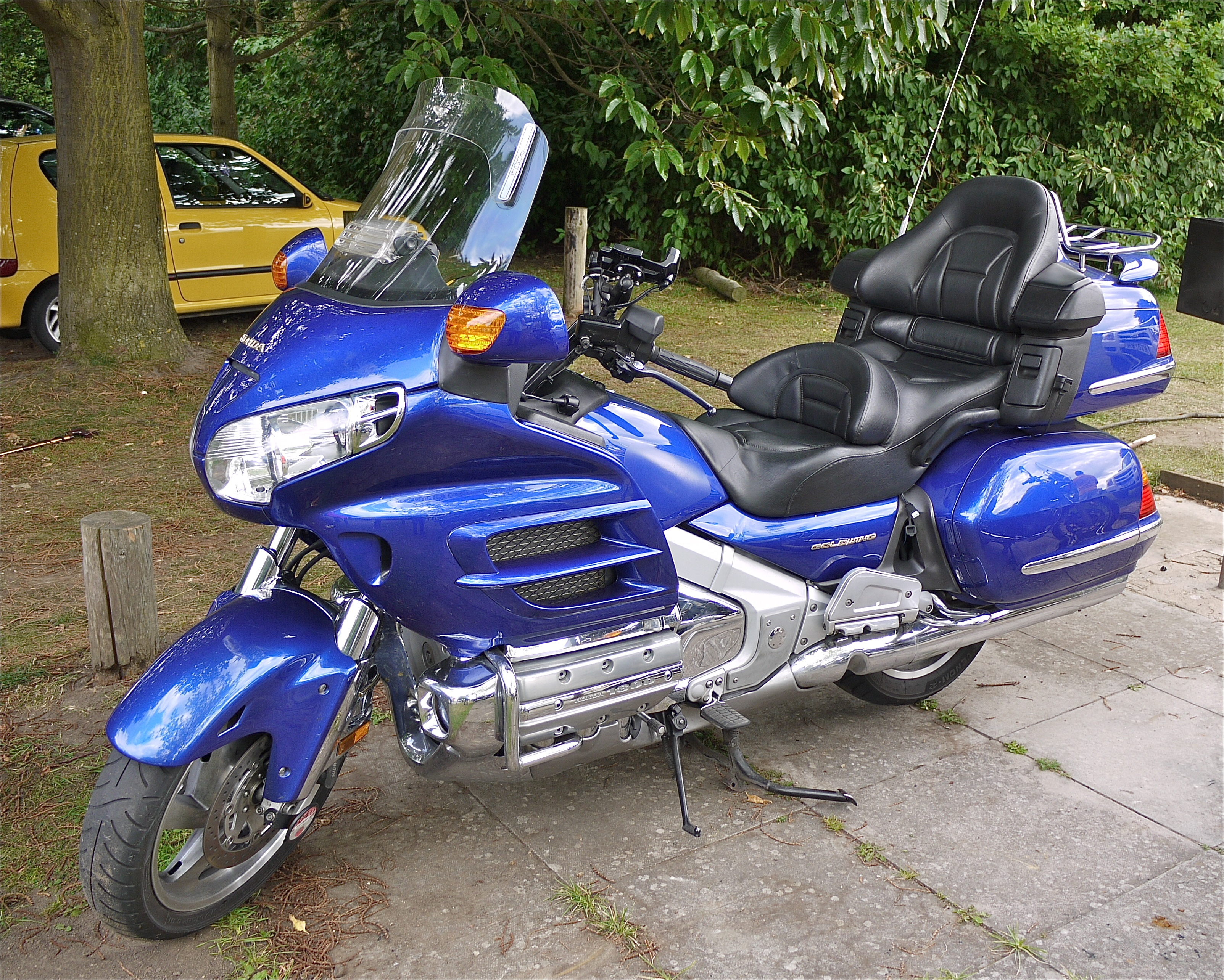 Panasonic G1 14-45 Lens